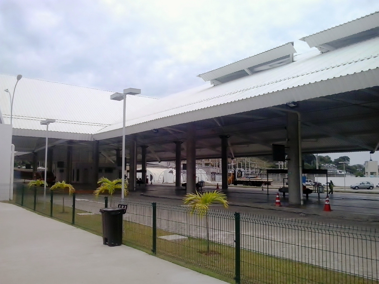 Terminal rodoviário| da estação Retiro ainda sem funcionar, Salvador, Bahia, Brasil.